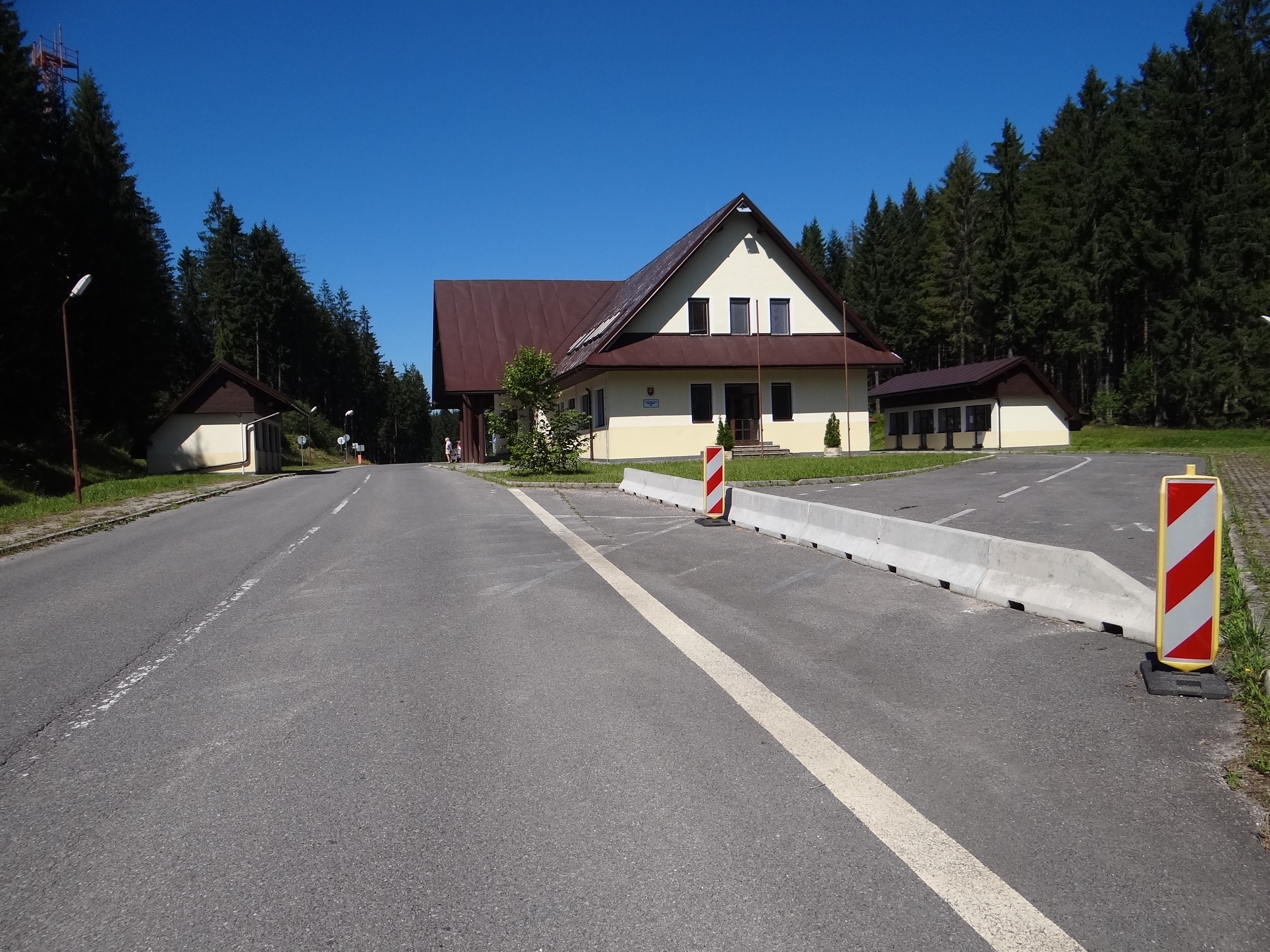 Dawne przejście graniczne Ujsoły-Novoť, na przełęczy Glinka